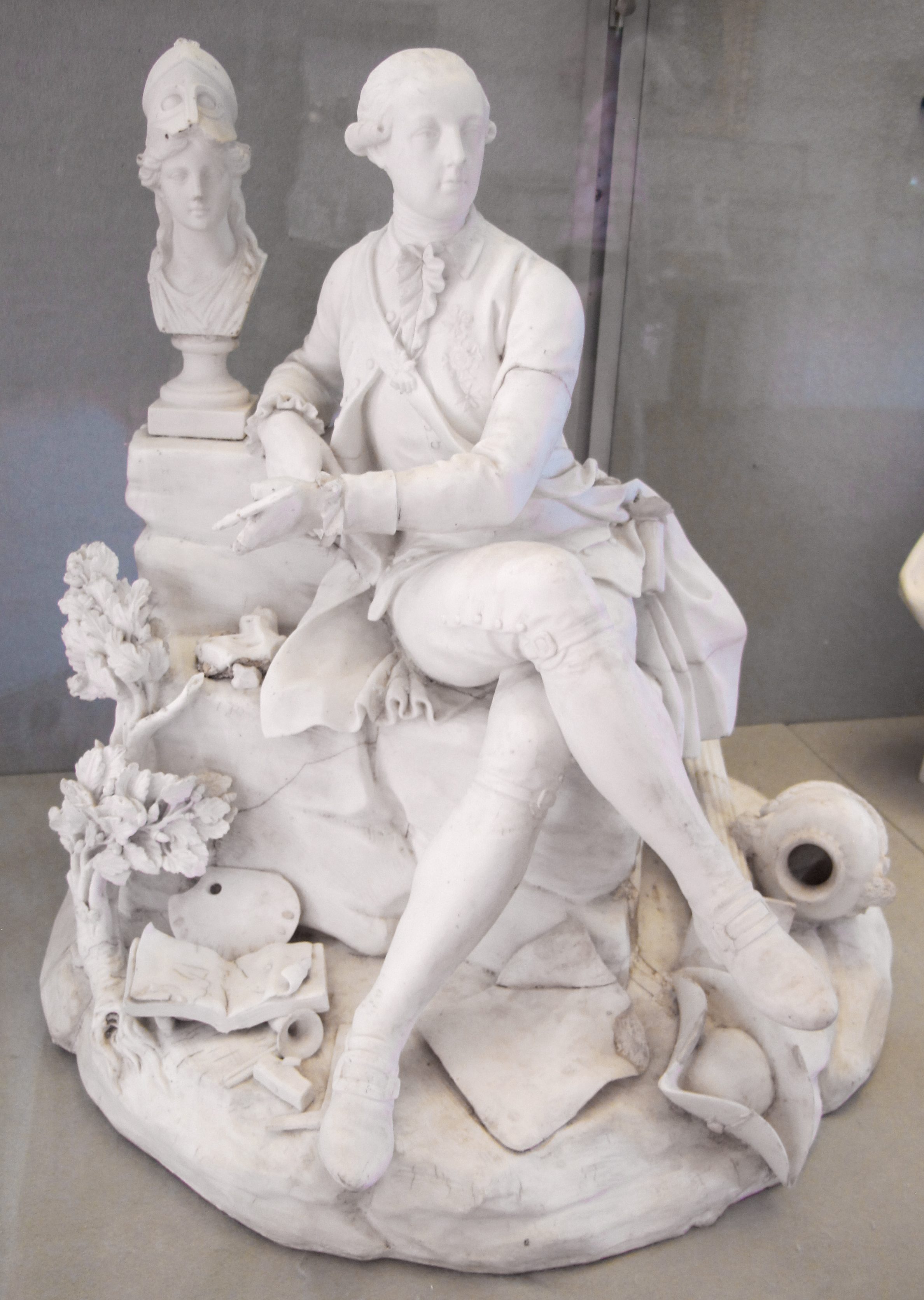 Porcelain Museum (Florence) - Vienna porcelain. Pair of biscuit porcelain sculptural groups depicting (Maria Theresa and) Joseph II of Austria, ca 1780, designed by Anton Grassi (1755-1807), Vienna. Austria, 18th century.